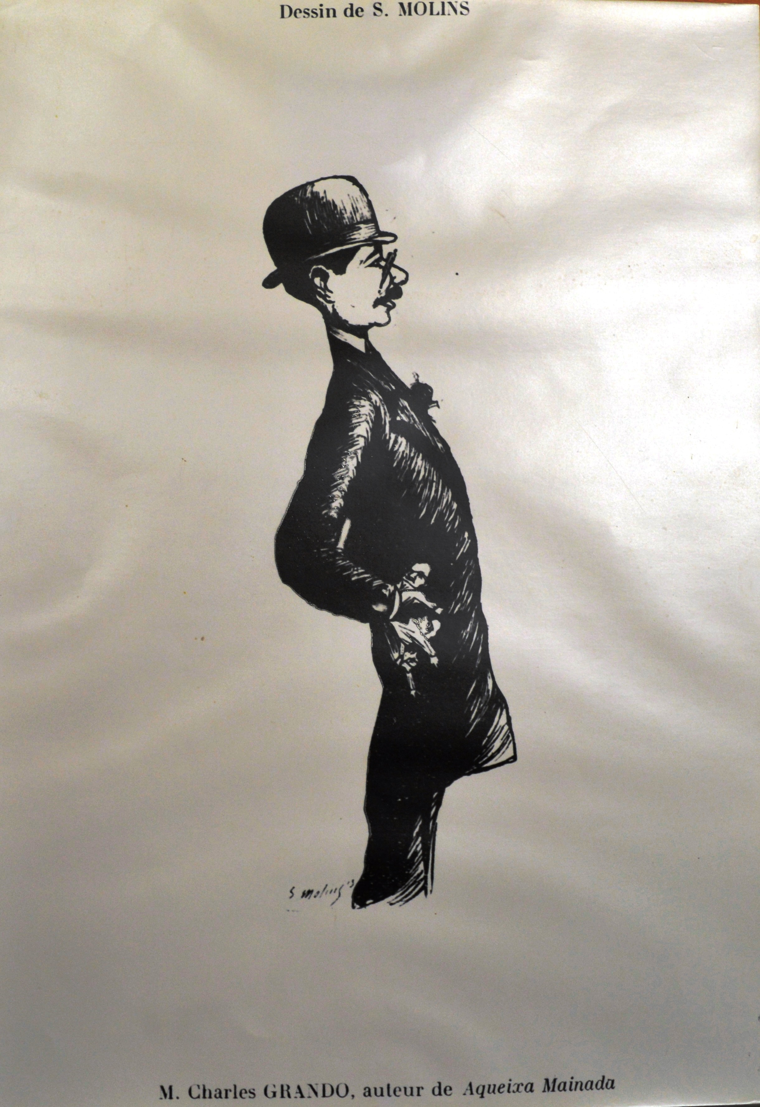 caricature de Charles Grando dessinée par S. molins, 1919.